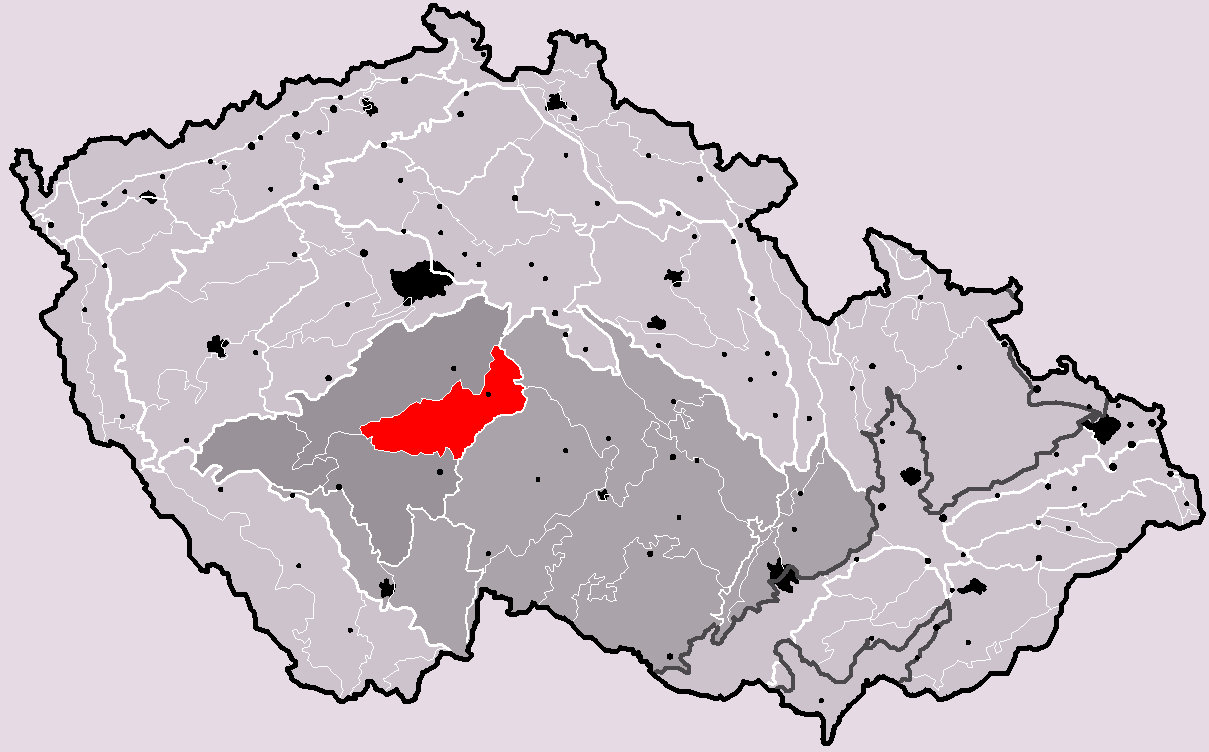 Poloha geomorfologického celku Vlašimská pahorkatina v rámci České republiky. Hercynský systém Hercynská pohoří I Česká vysočina I2 (II) Česko-moravská subprovincie I2A (IIA) Středočeská pahorkatina I2A-2 (IIA-2) Vlašimská pahorkatina